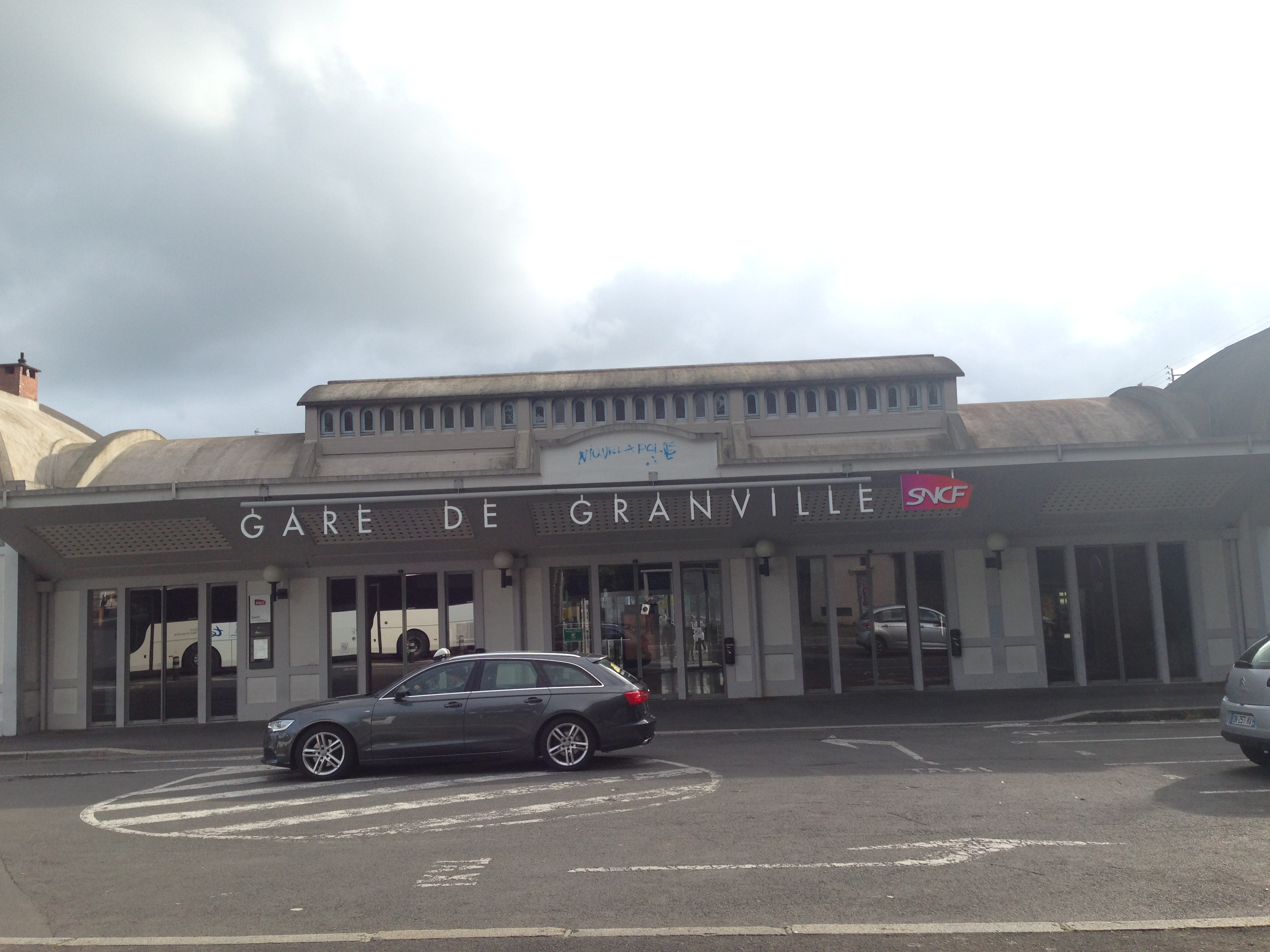 Gare de Granville-2015